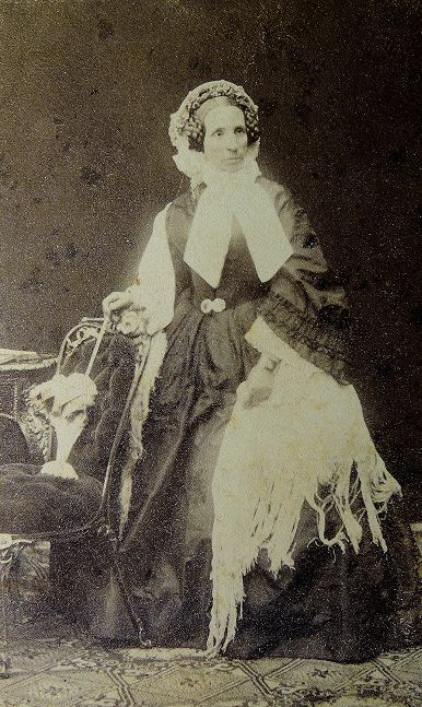 Portrait der Sängerin und Schauspielerin Marie Weiler (1809–1864), Lebensgefährtin Johann Nestroys